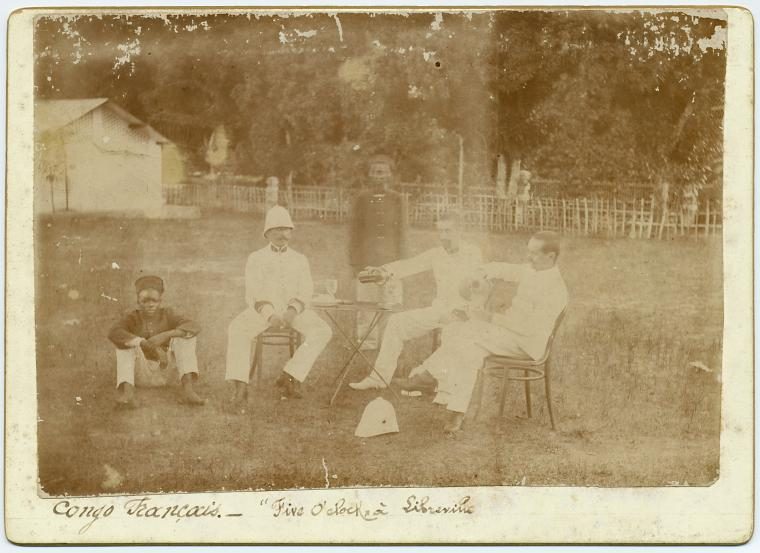 Congo